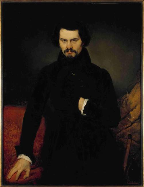 Portrait d'Edouard Fétis